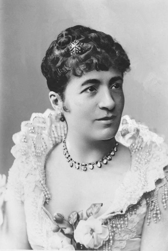 Franziska Ellmenreich Franziska Ellmenreich [Franziska Ellmenreich (Porträt)]